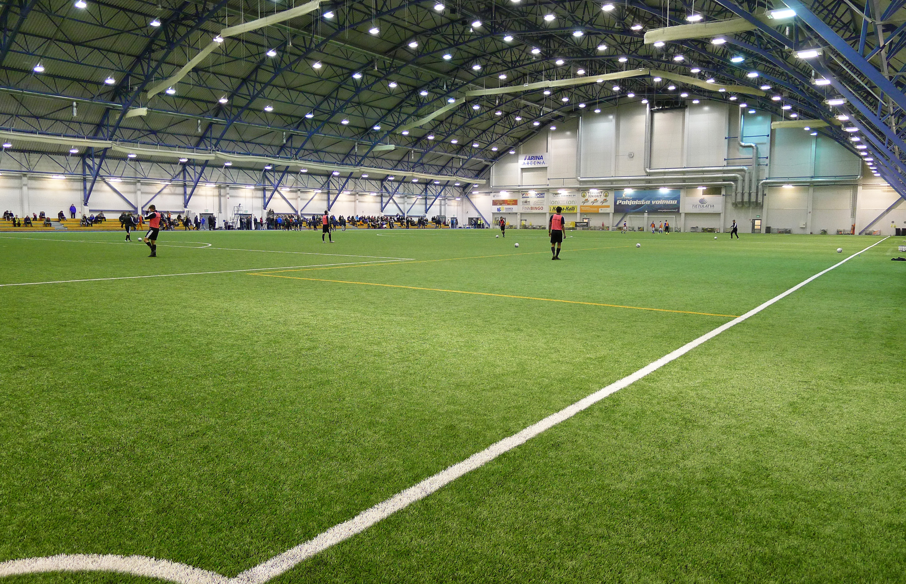 Heinäpään jalkapallohalli 4.2.2016